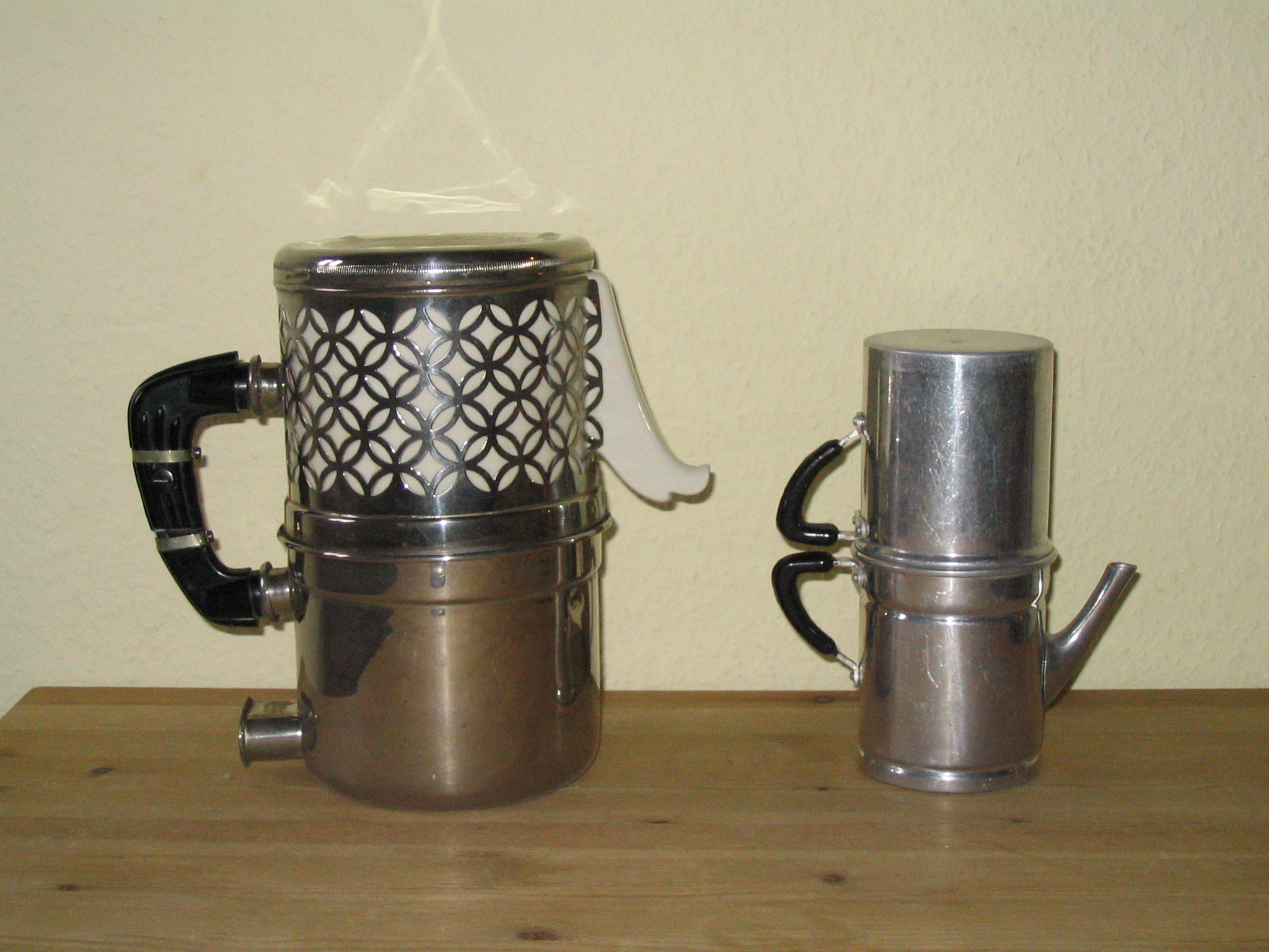 Napoletaner und elektrische Kippkanne. In der Mitte der Kanne befindet sich der kaffeefilter.